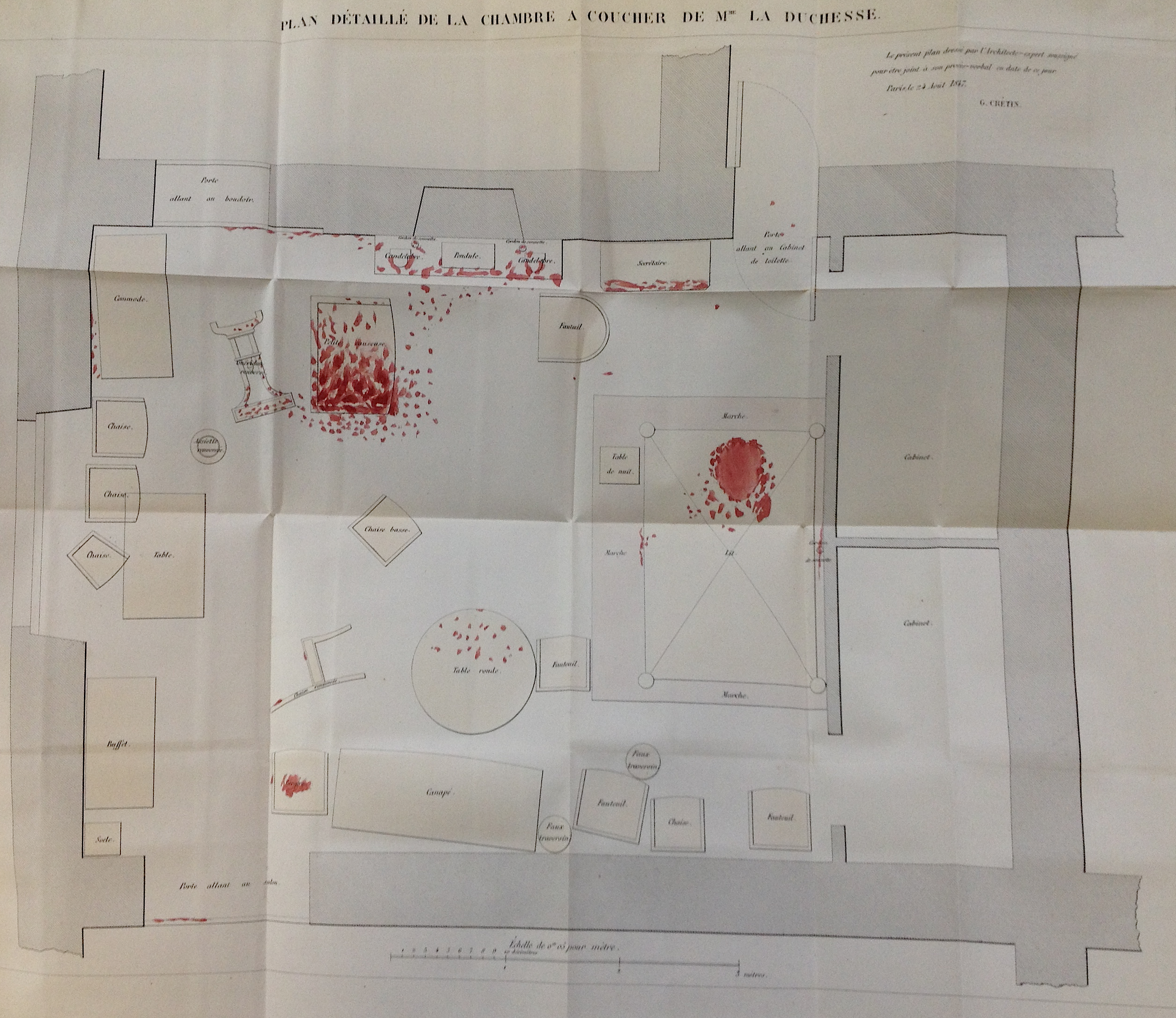 Die Duchesse de Choiseul-Praslin wurde in ihrem Schlafzimmer ermordet. Publizierte Skizze einschließlich der aufgefundenen Blutspuren.